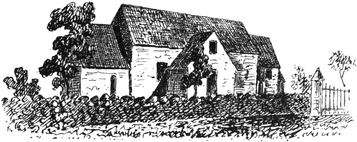 Fornåsa kyrka i Östergötland. Teckning i "Utdrag af Antiqvitets-Intendenten P. A. Säves afgifna berättelse för år 1861", publicerad i Antiqvarisk tidskrift för Sverige band 1, 1864.